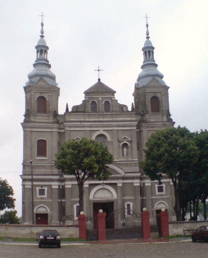 Parysów - kościół parafialny pw. Wniebowzięcia NMP (zabytek